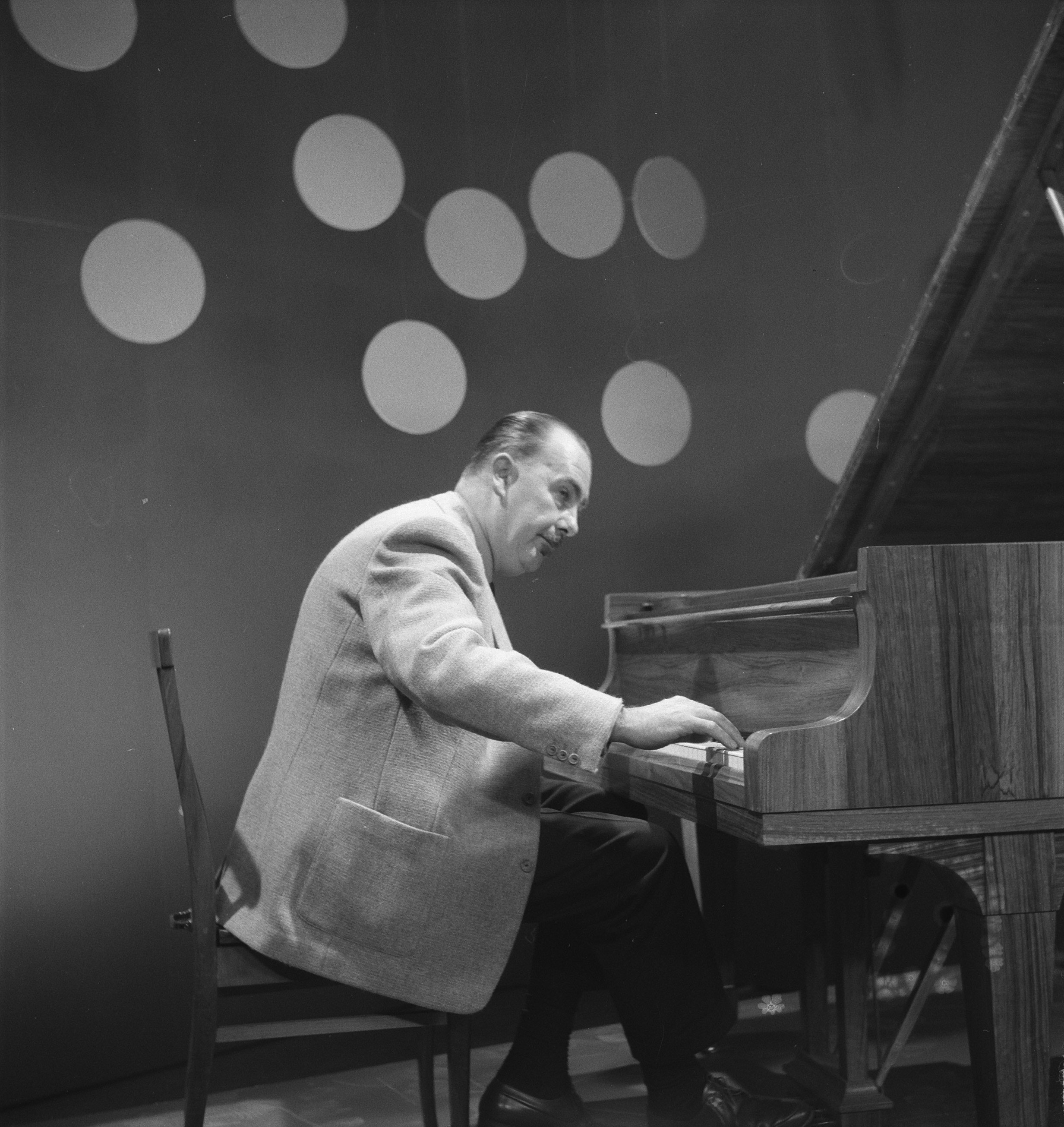 Collectie / Archief : Fotocollectie Anefo Reportage / Serie : [ onbekend ] Beschrijving : Fred Rombouts presenteert "Musicbox" voor KRO, Melle Weersma aan de vleugel Datum : 1 februari 1961 Trefwoorden : piano's Persoonsnaam : Weersma, Melle Instellingsnaam : KRO Fotograaf : Rossem, Wim van / Anefo Auteursrechthebbende : Nationaal Archief Materiaalsoort : Negatief (zwart/wit) Nummer archiefinventaris : bekijk toegang 2.24.01.03 Bestanddeelnummer : 912-0435